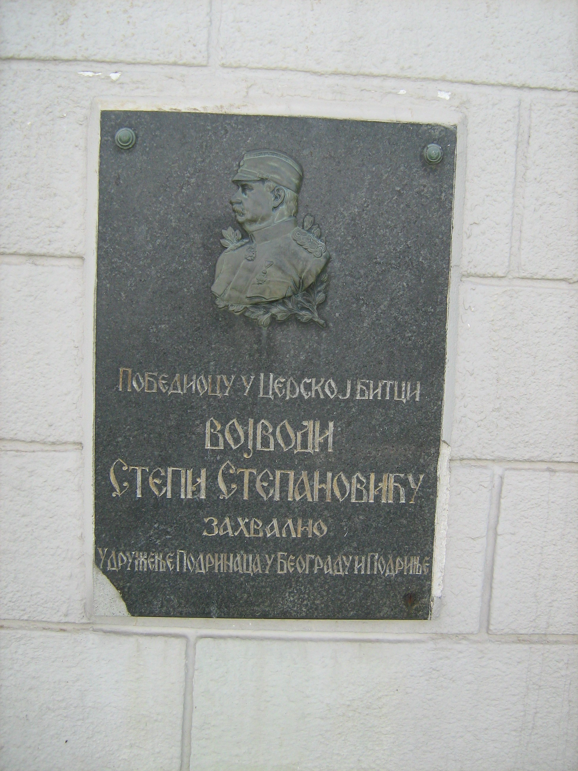 спомен плоча Степи Степановићу, Церска битка